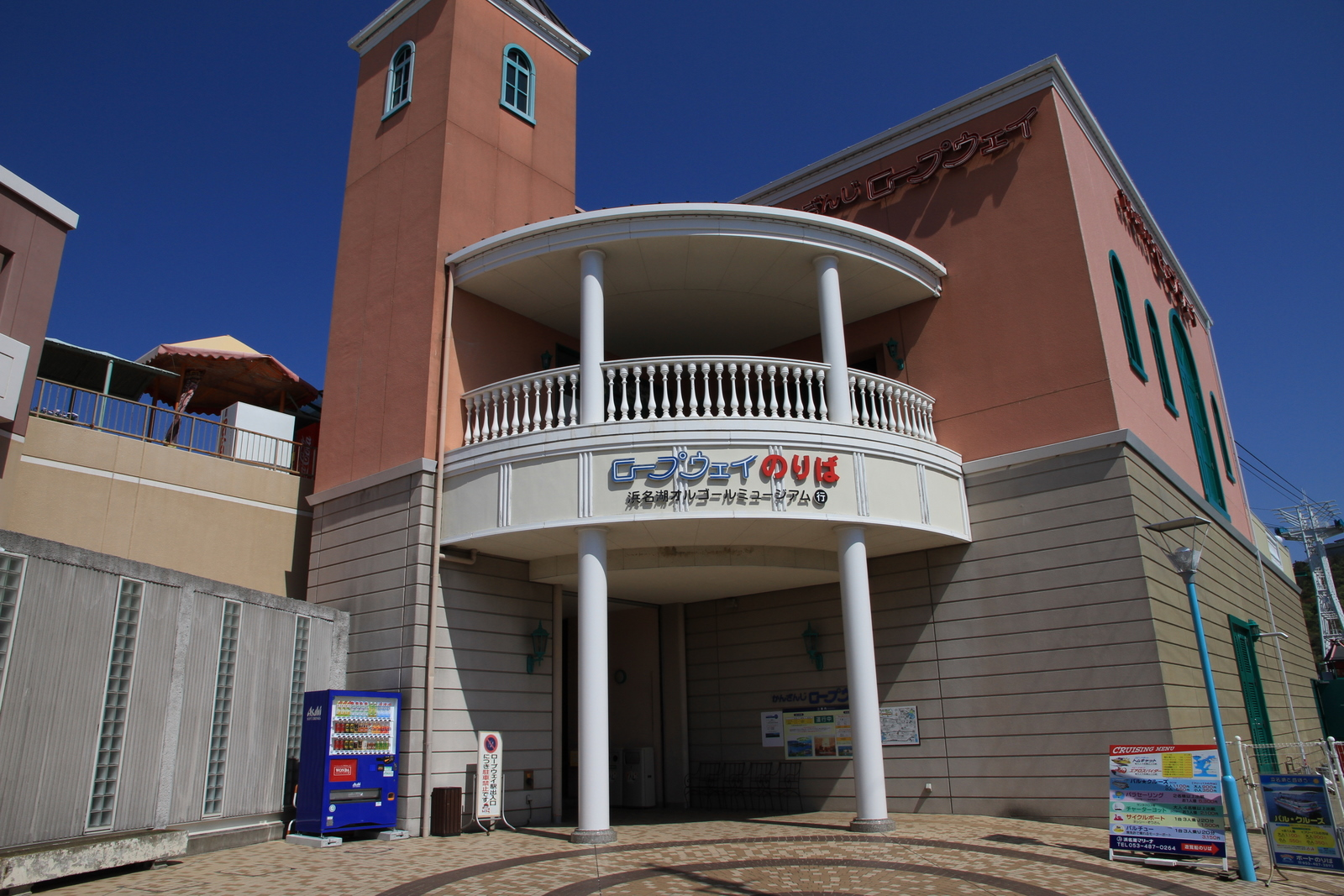 かんざんじロープウェイ かんざんじ駅